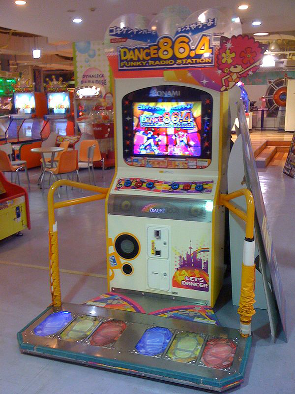 DANCE86.4 FUNKY RADIO STATION 筐体 "DANCE 86.4 FUNKY RADIO STATION" cabinet